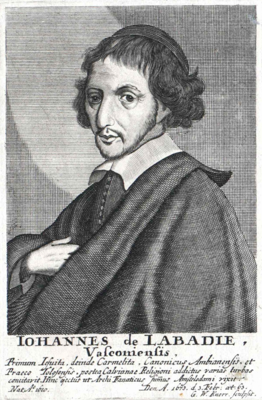 Jean de Labadie (1610–1674)